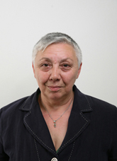 Politica italiana